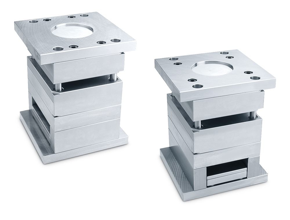 Fertig verbohrte Standardformen